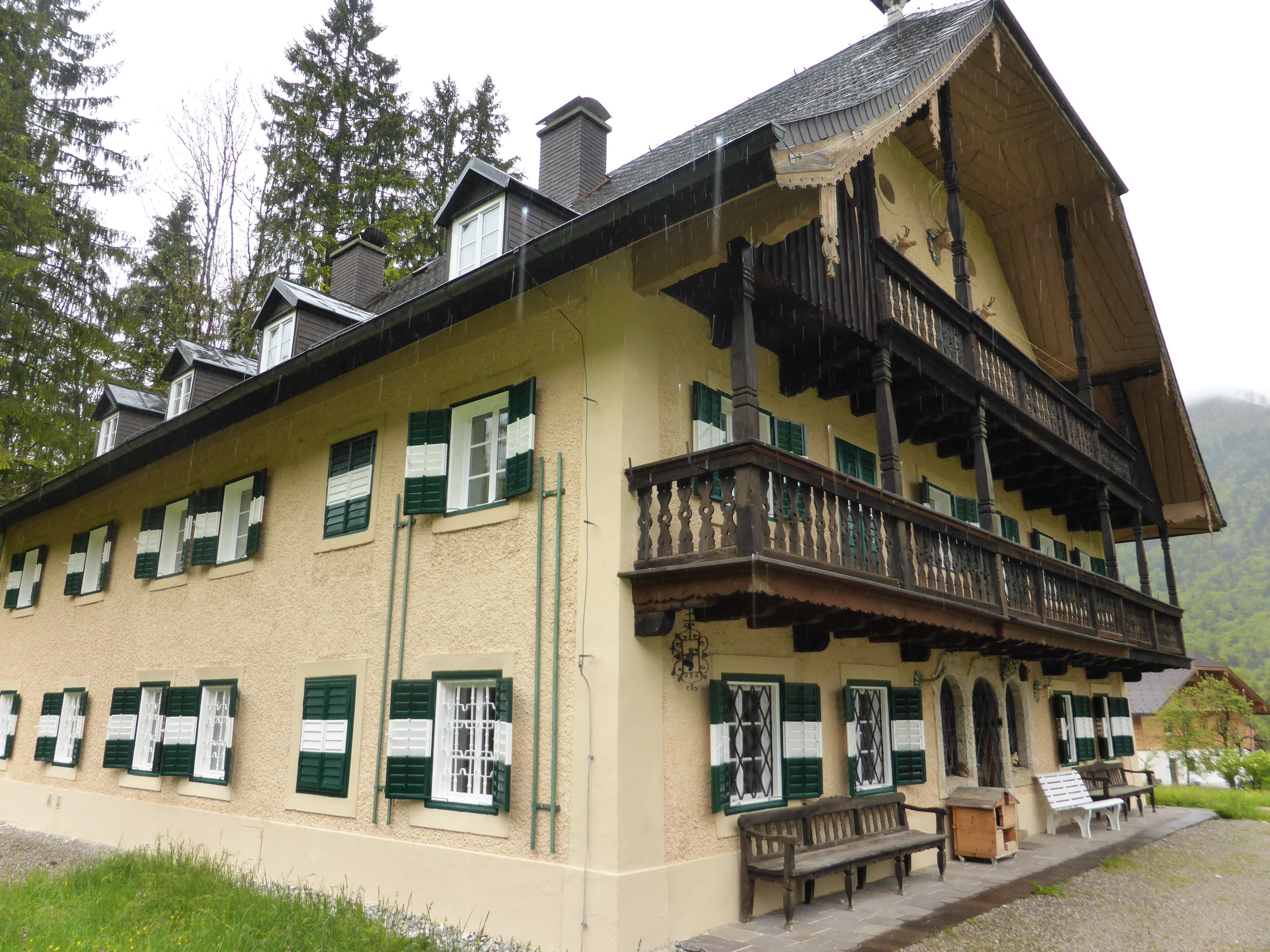 Ehem. Jagdschloss Langreith